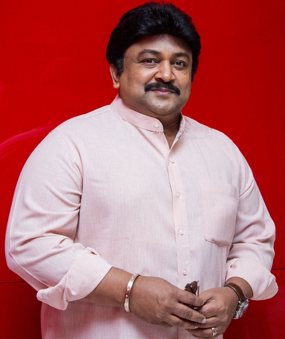 Prabhu at Wagah Audio Launch